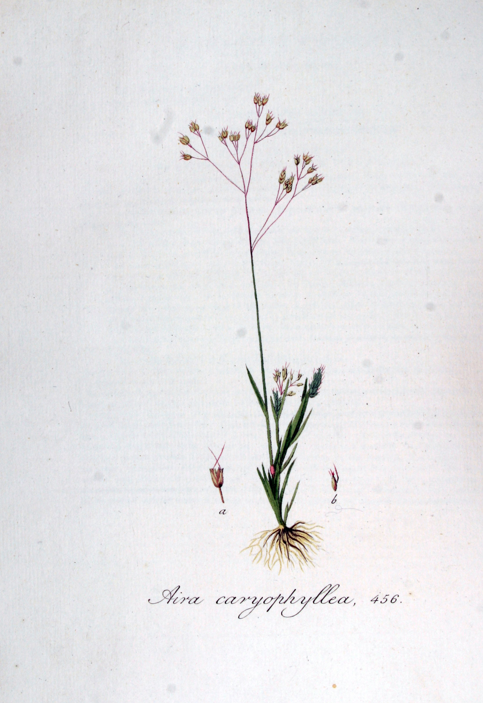 Aira caryophyllea L.